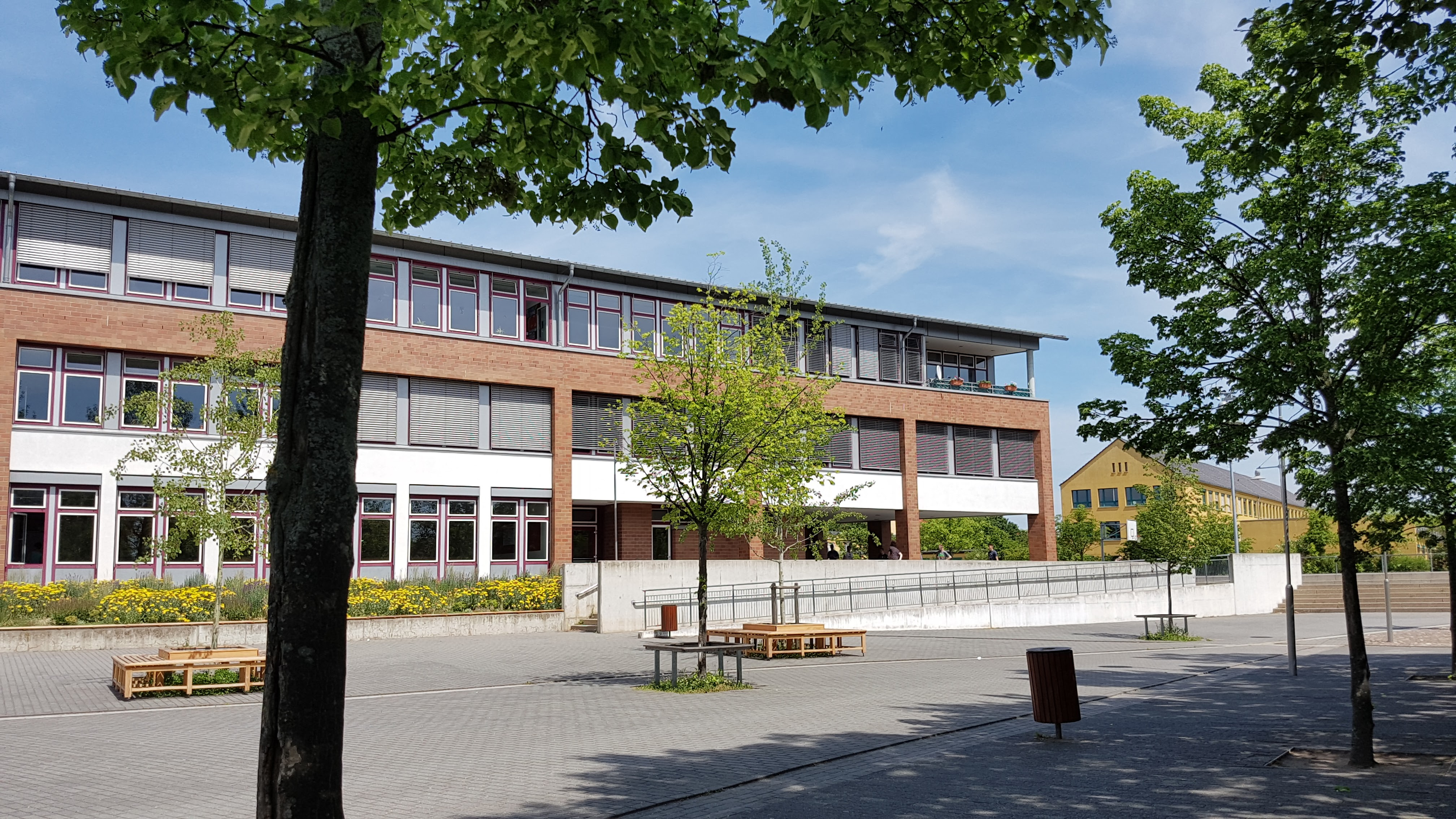 Schulgebäude des Elisabeth-Gymnasiums in Halle (Saale), Murmansker Straße 14